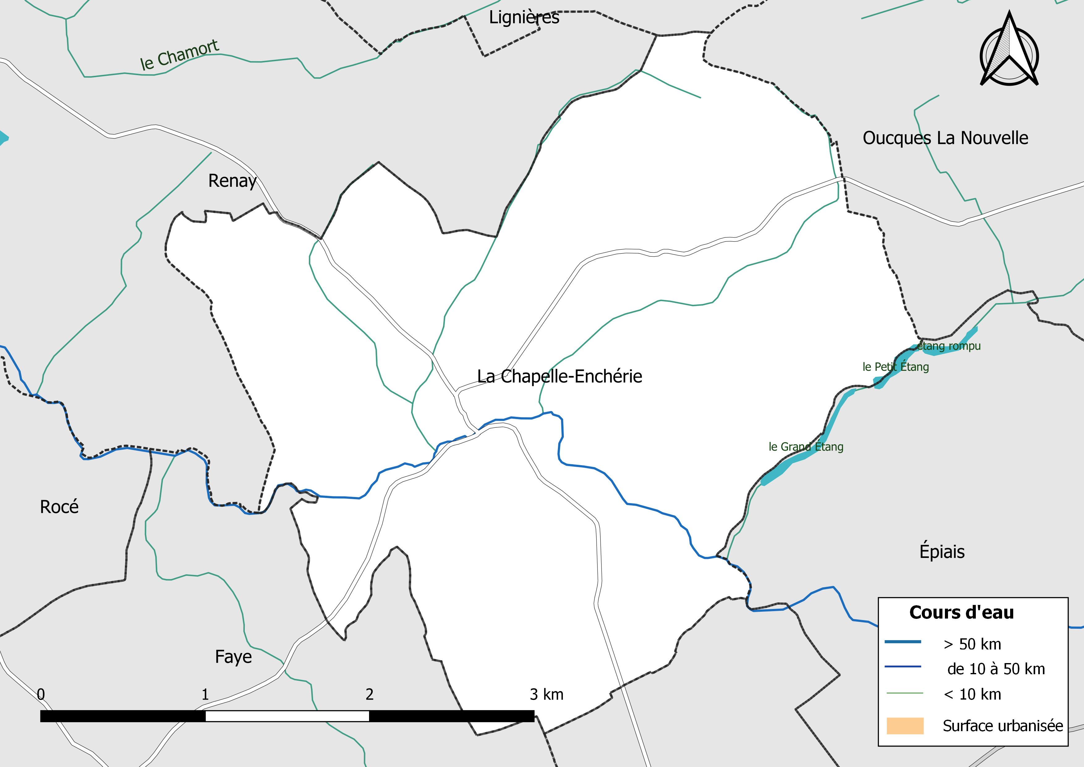 Carte du réseau hydrographique de la commune de La Chapelle-Enchérie (Loir-et-Cher, France).